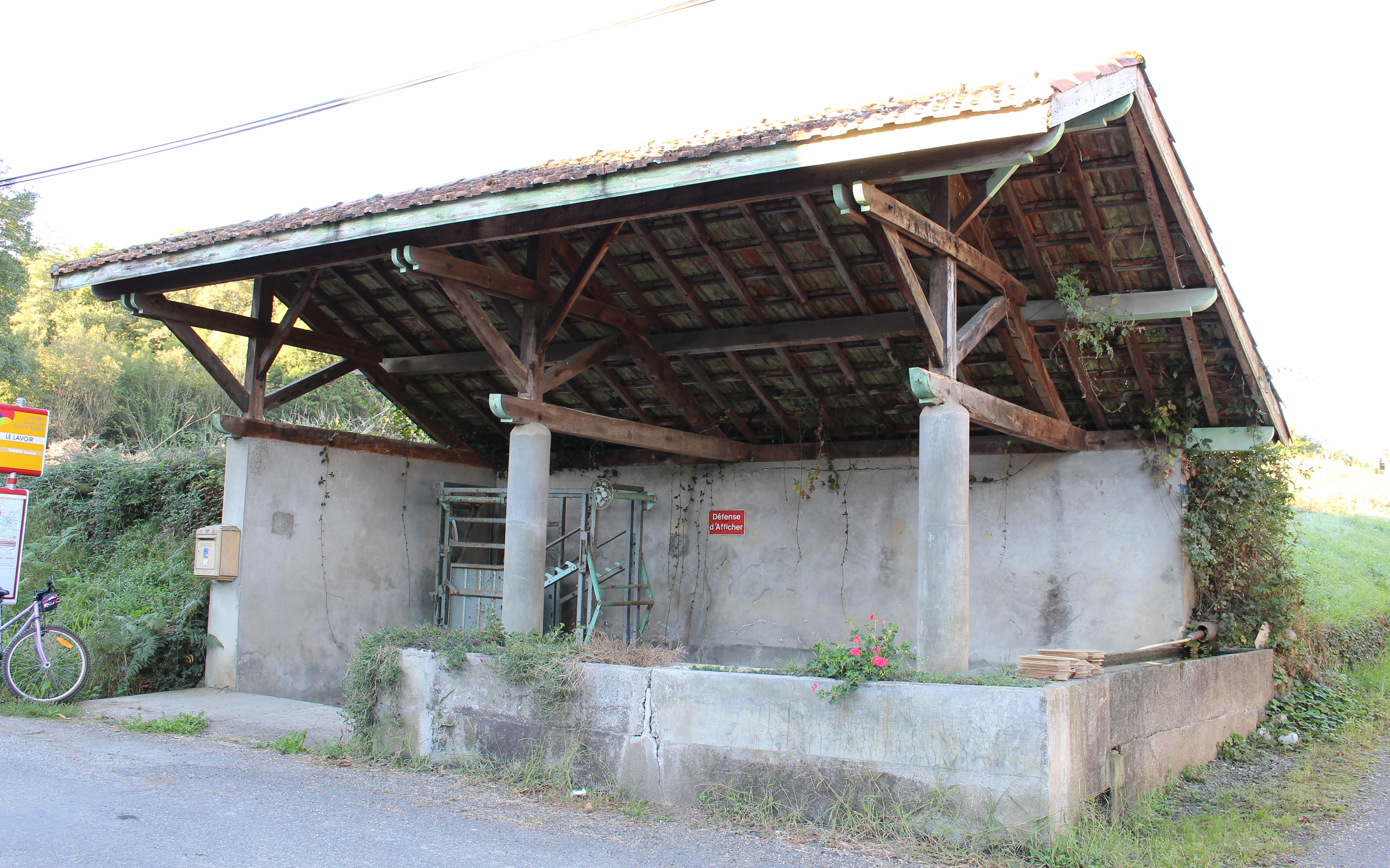 Lavoir de Sarrouilles (Hautes-Pyrénées)